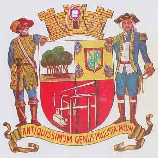 Brasão de Santo Amaro, antes da indexação a São Paulo.